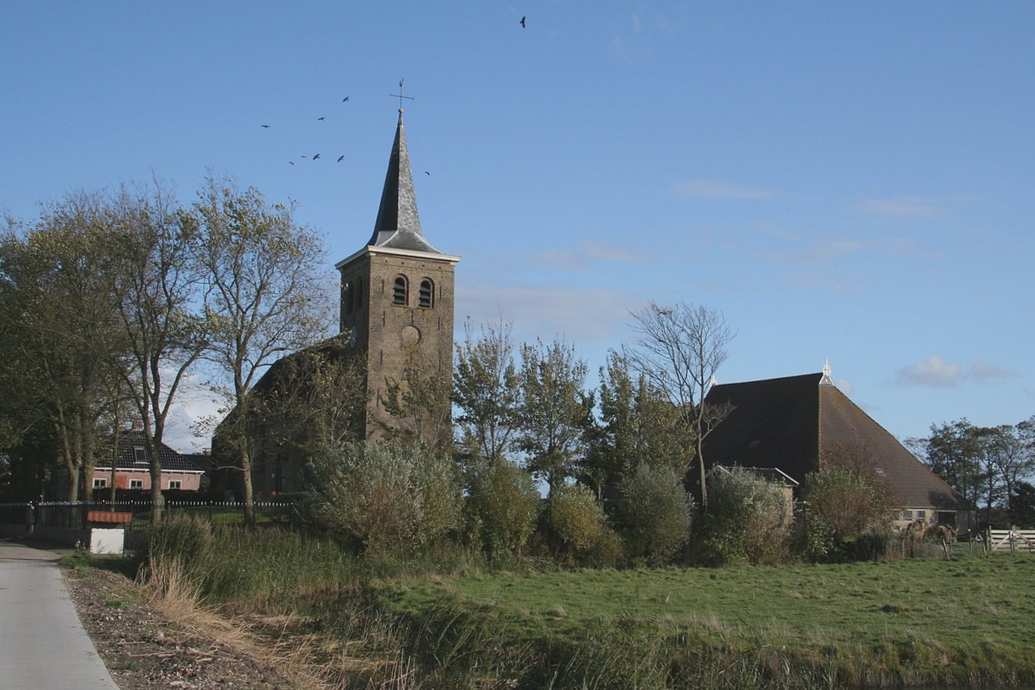 Mariakerk Bears (Beers)